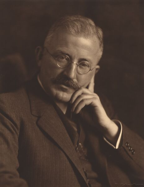 Porträt von Hermann Staudinger